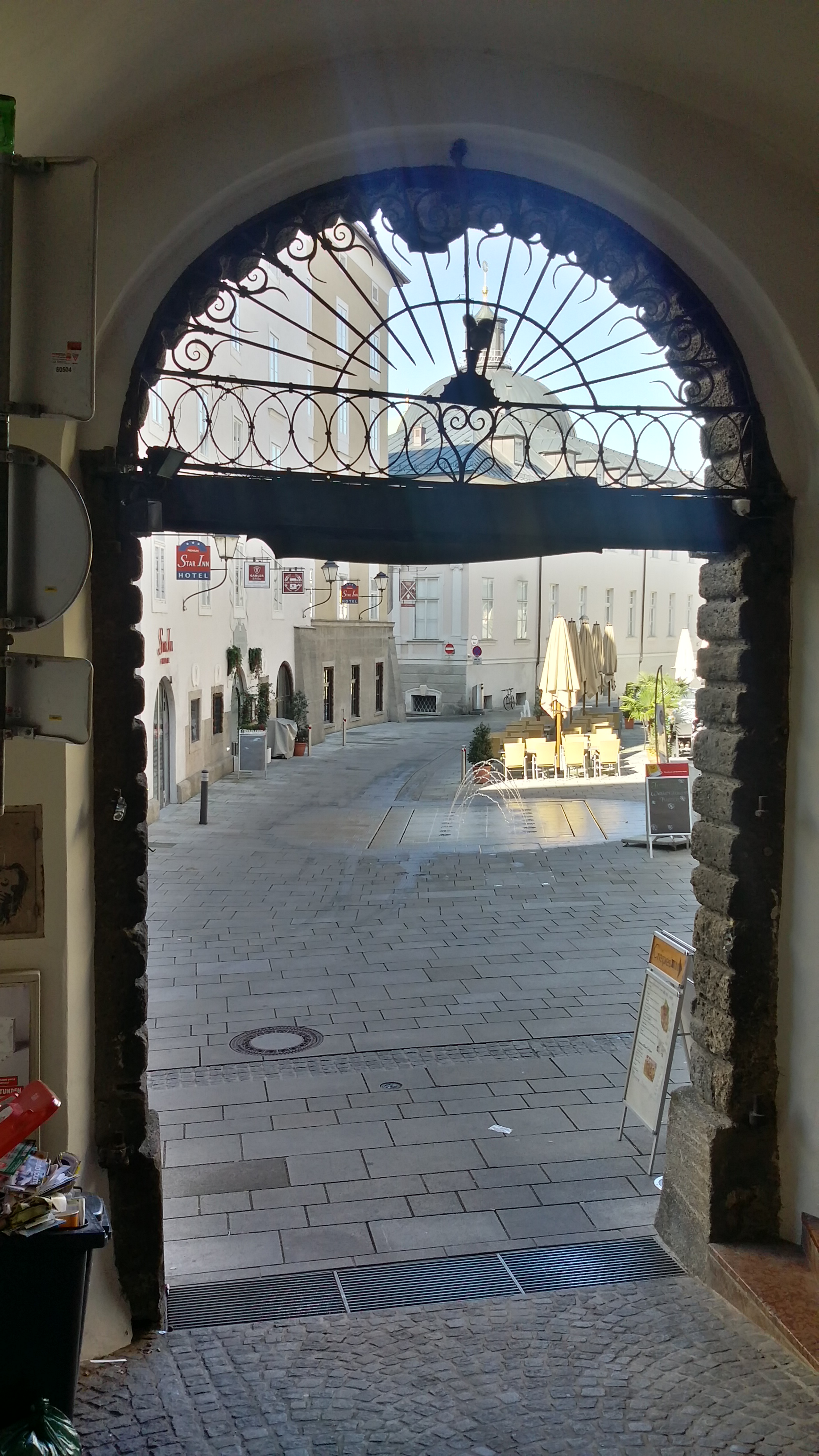 Aufgangstor zum Kapuzinerberg